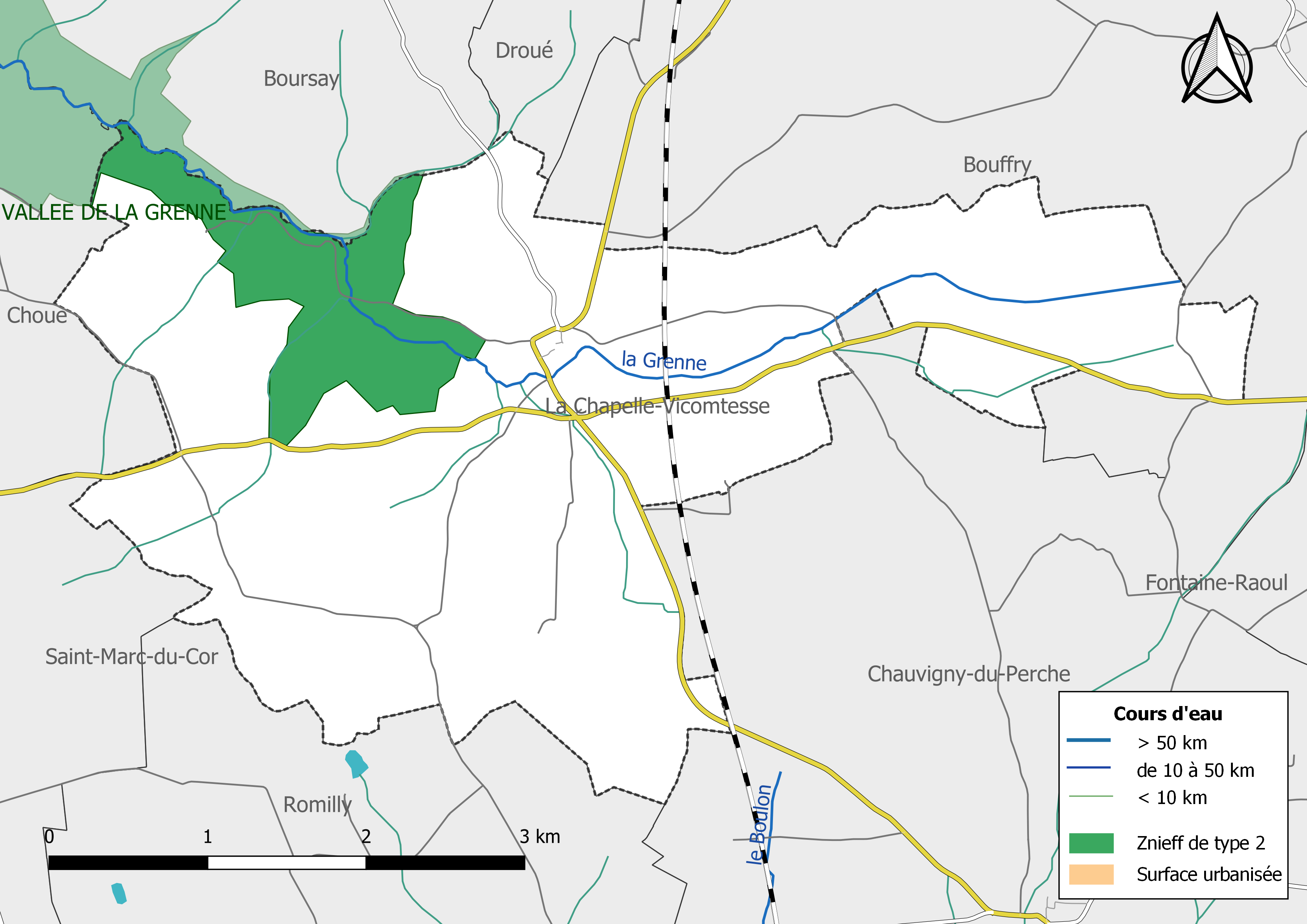 Carte des Zones naturelles d'intérêt écologique faunistique et Floristique (ZNIEFF) de type 2 de la commune de La Chapelle-Vicomtesse. (Loir-et-Cher, France).